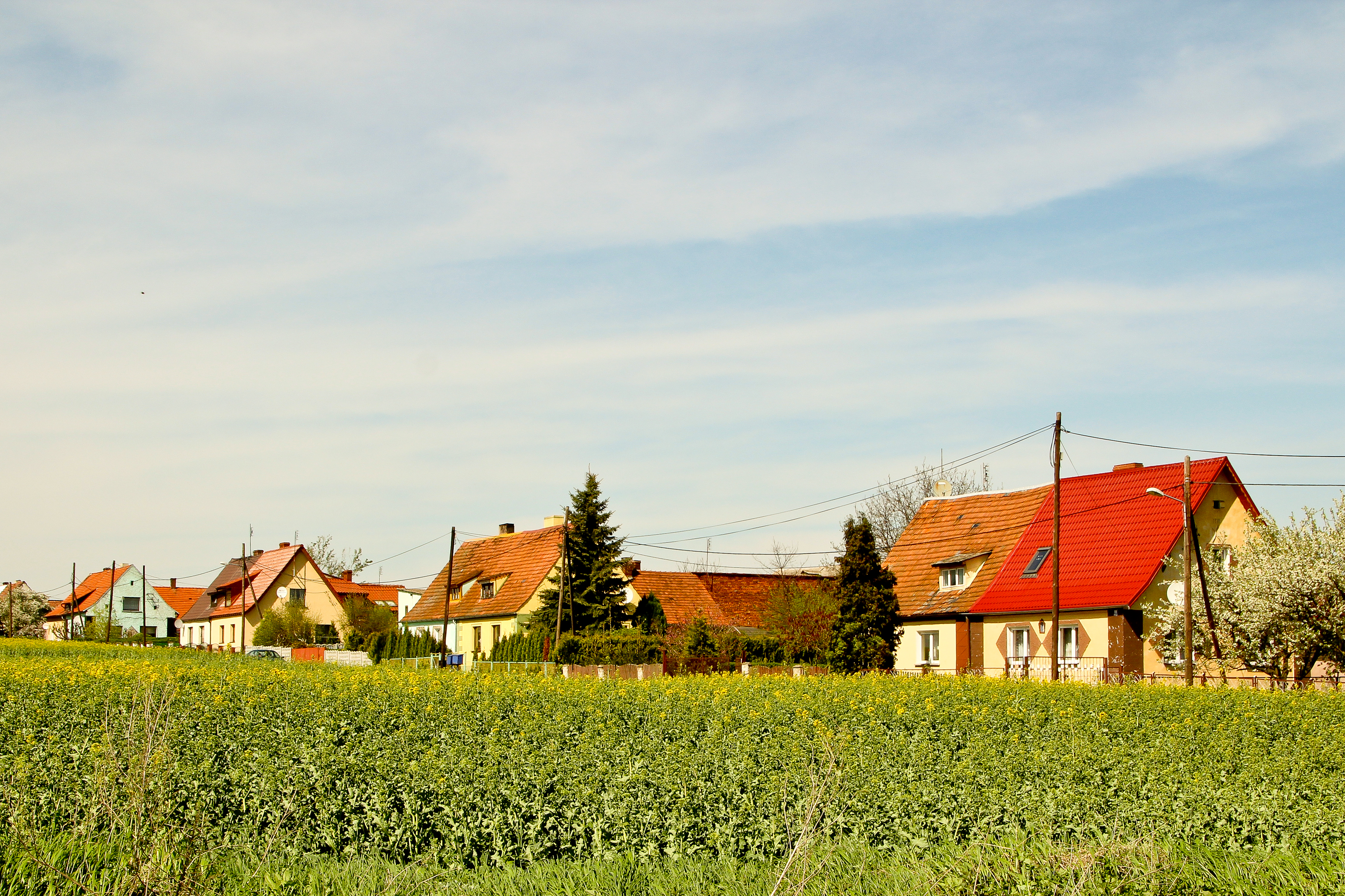 Wysoka - wieś w gminie Branice w Polsce położona w województwie opolskim, w powiecie głubczyckim.